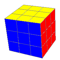 Løst Rubik's Cube